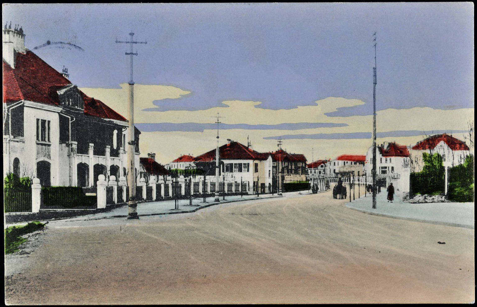 青岛德县路德租时期明信片